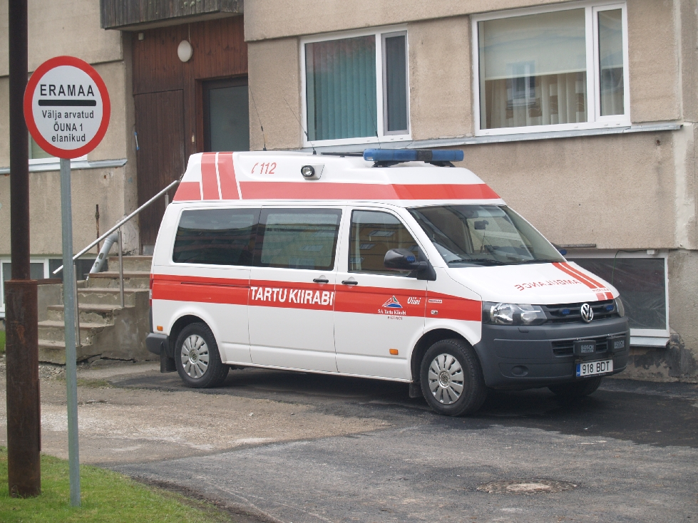 Põltsamaa vaade: Tartu kiirabi auto